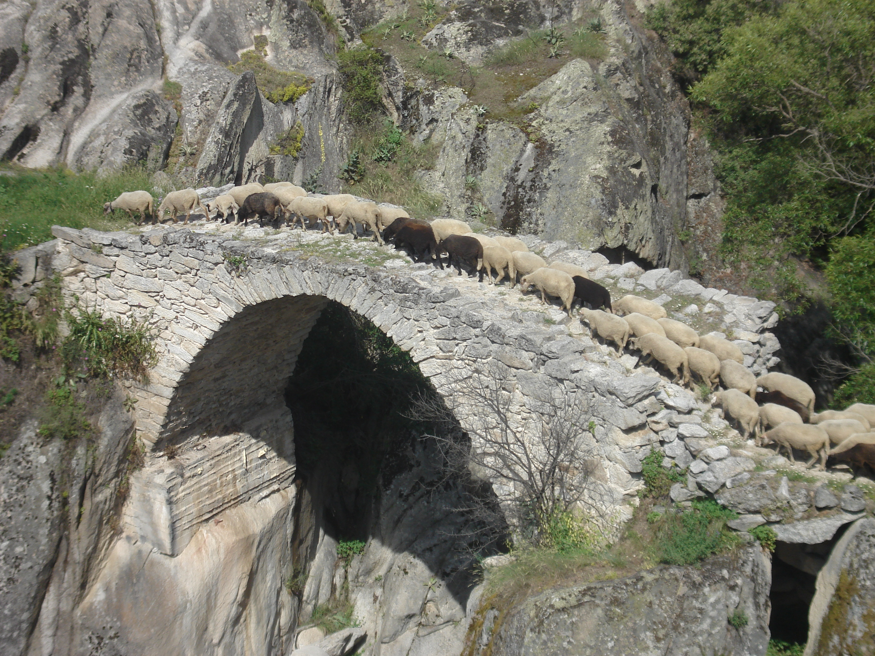 Старият каменен мост край Зовик, Мариово.